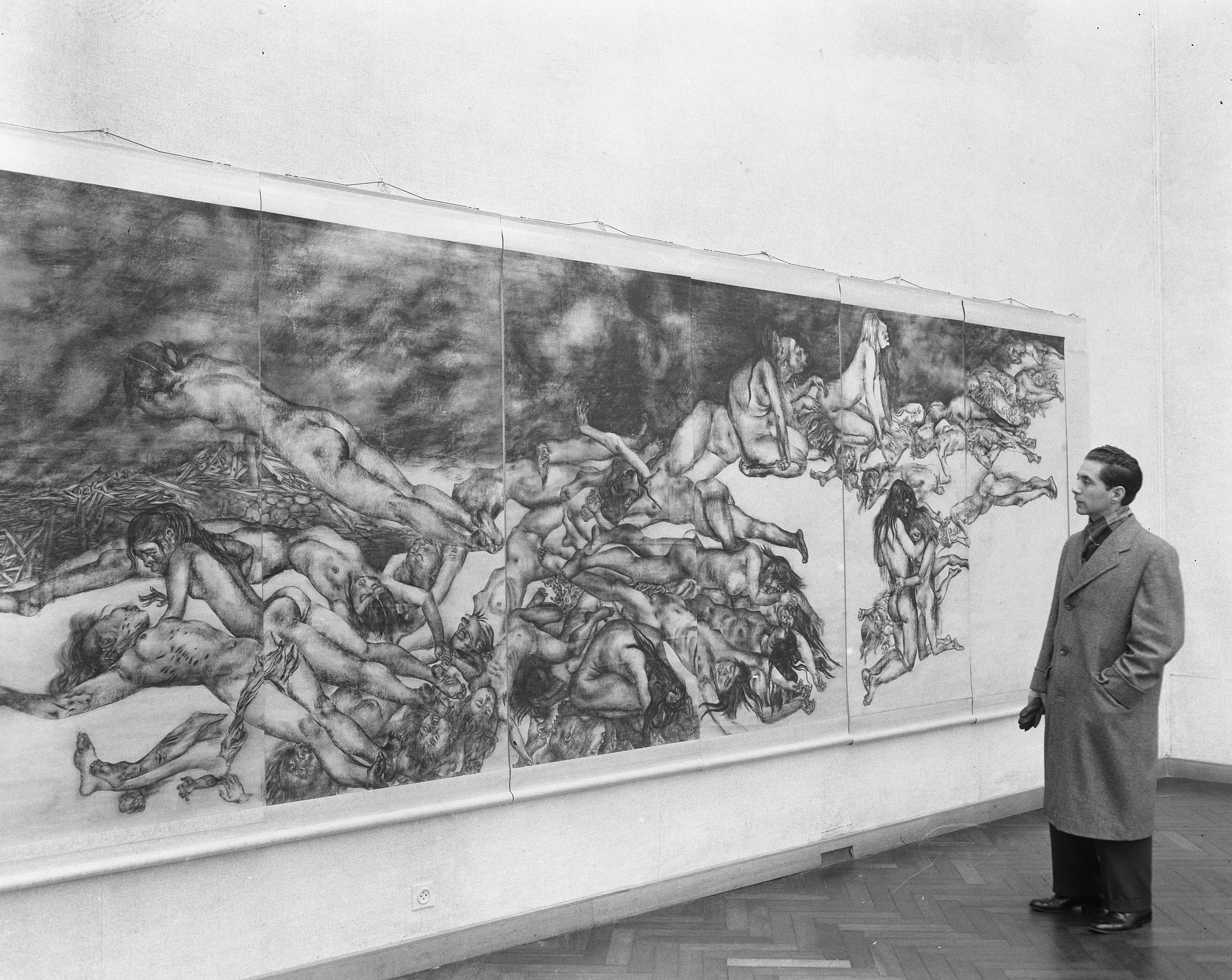 Collectie / Archief : Fotocollectie Anefo Reportage / Serie : [ onbekend ] Beschrijving : Japanse tekeningen atoomaanslag Hirosjima Stedelijk Museum Datum : 26 februari 1957 Locatie : Hiroshima Trefwoorden : Musea, TEKENINGEN Fotograaf : Bilsen, Joop van / Anefo Auteursrechthebbende : Nationaal Archief Materiaalsoort : Negatief (zwart/wit) Nummer archiefinventaris : bekijk toegang 2.24.01.04 Bestanddeelnummer : 908-3577